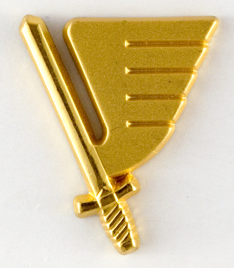 Arméflygets truppslagstecken m/60 (finns även som spegelvänt tecken för höger kragsnibb). Bars av personal vid Arméflyget mellan 1991 och 1997 samt av f.d. arméflygare vid Försvarsmaktens Helikopterflottilj mellan 1998 och 2007. De olika förbanden inom Arméflyget (AF) samt Helikopterflottiljen (Hkpflj) åtskildes genom en konturskuren matta med traditionsfärgen monterades under tecknet : AF: AF1 bar blå filtmatta. AF2 bar gul filtmatta. Hkpflj: 1.hkpbat bar blå filtmatta. 2.hkpbat bar röd filtmatta. 4.hkpbat bar gul filtmatta.